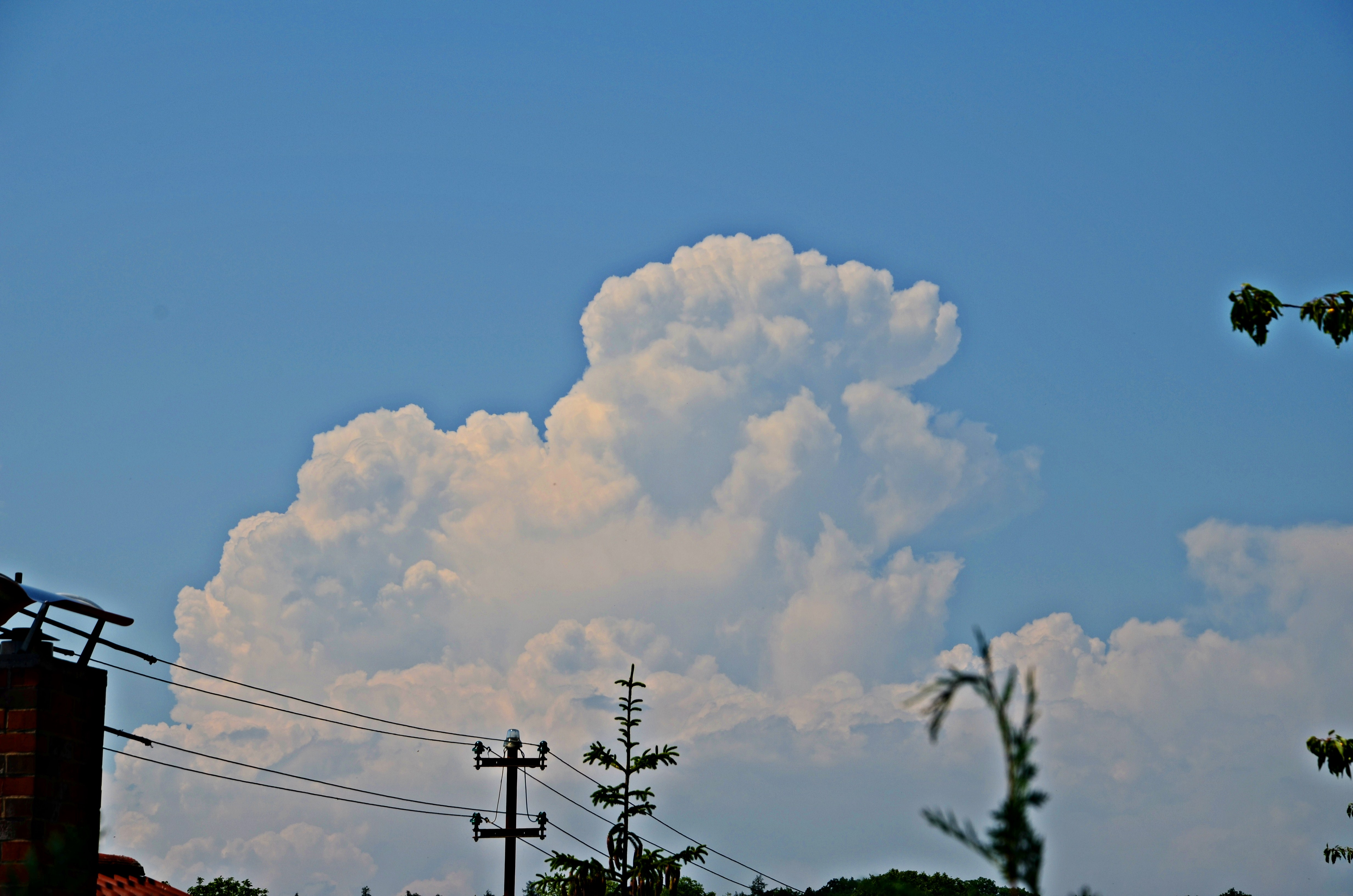 Gewitterwolke im Landkreis Heilbronn